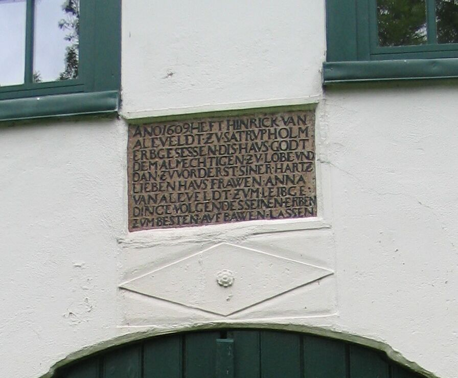 Tafel